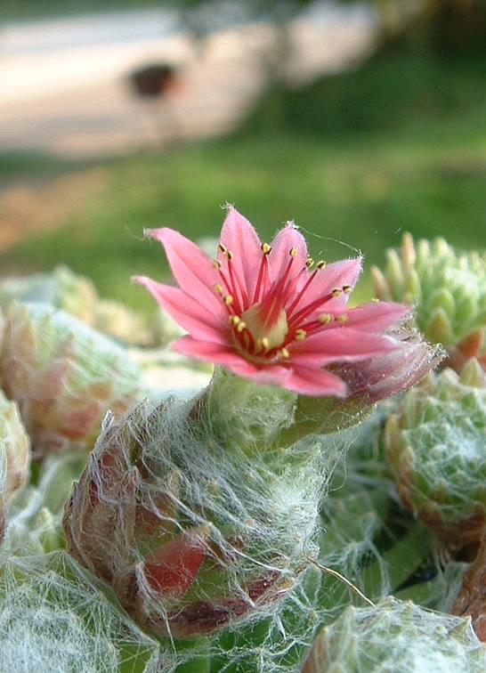 Sempervivum arachnoideum Joubarbe toile d'araignée (potée), Août 2004